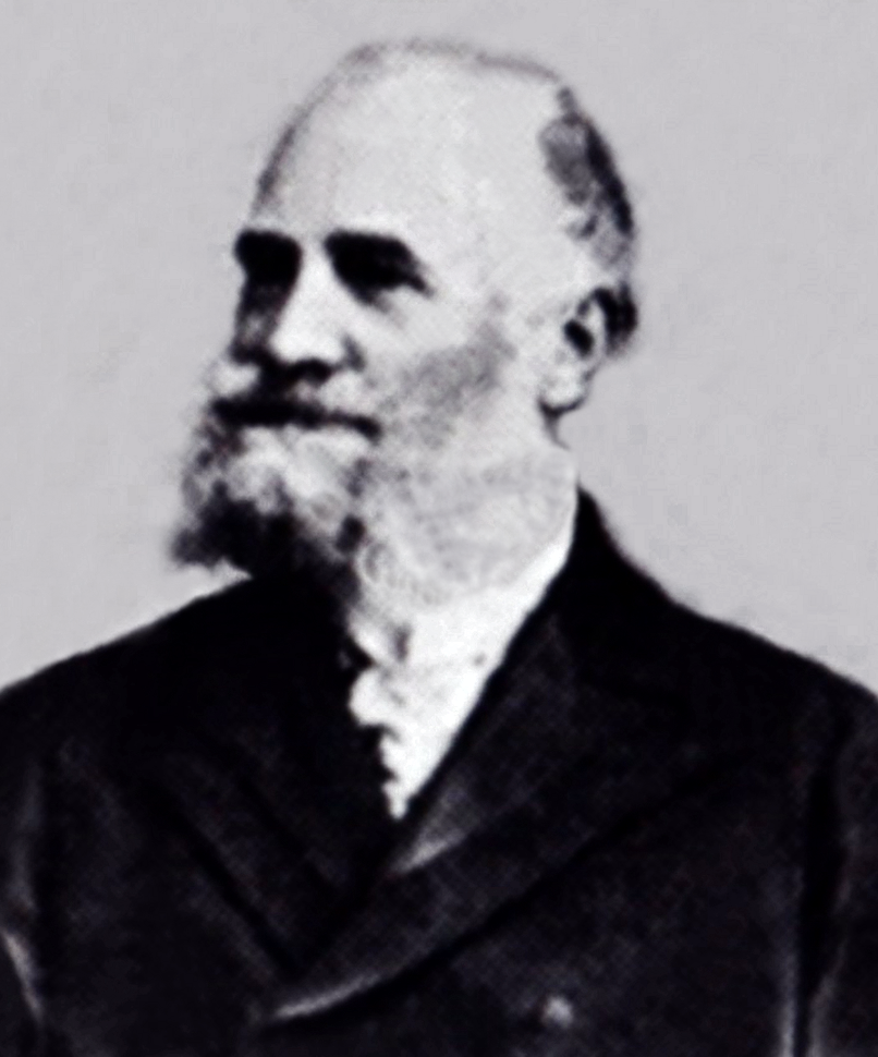 Felix Freiherr Brewer von Fürth nach 1900